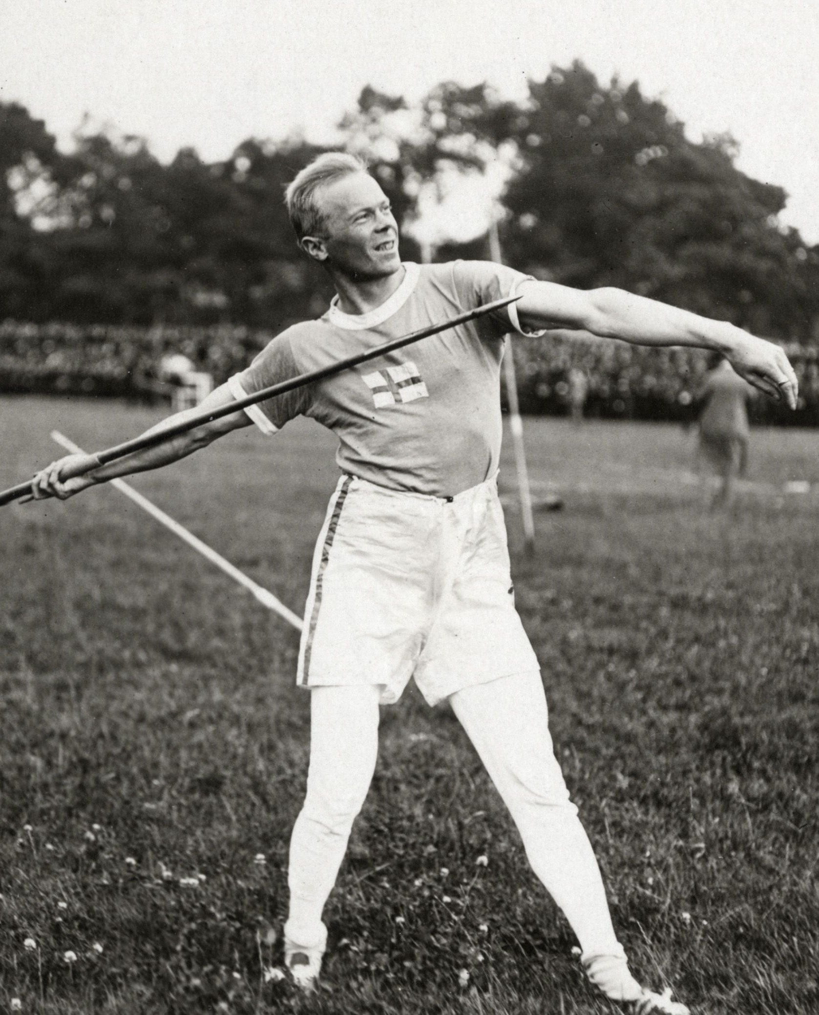 Olympische Spelen Antwerpen 1920. Atletiek: speerwerpen.